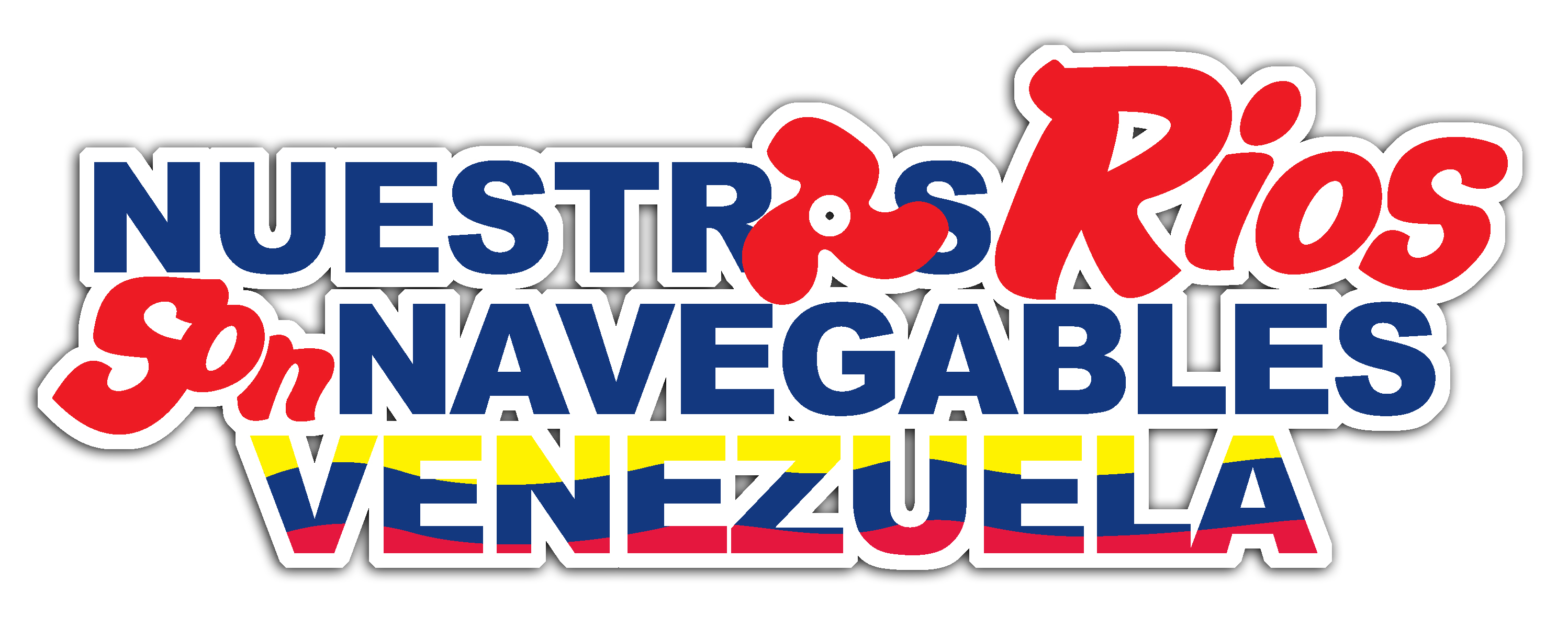 Logo NRSN